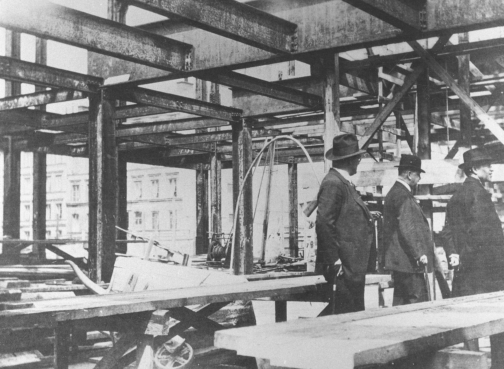 Besiktning av järnstommen för nya Konserthuset i Stockholm